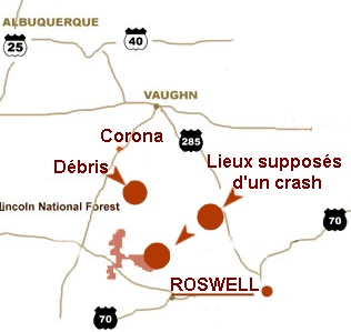 Localisation du crash de Roswell sur une portion de la carte du nouveau mexique